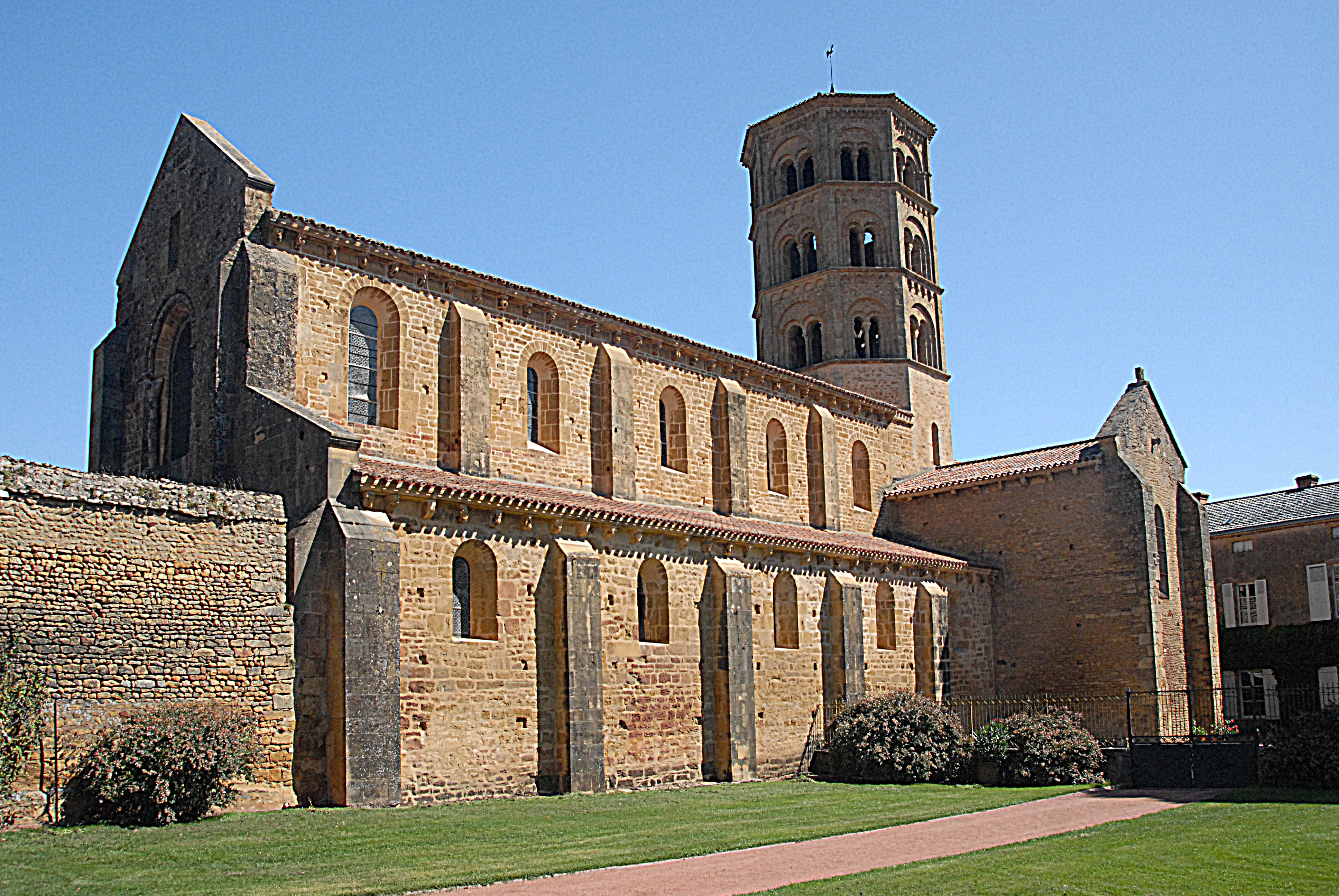 Ste-Trinité d'Ancy-le.Duc, von SW